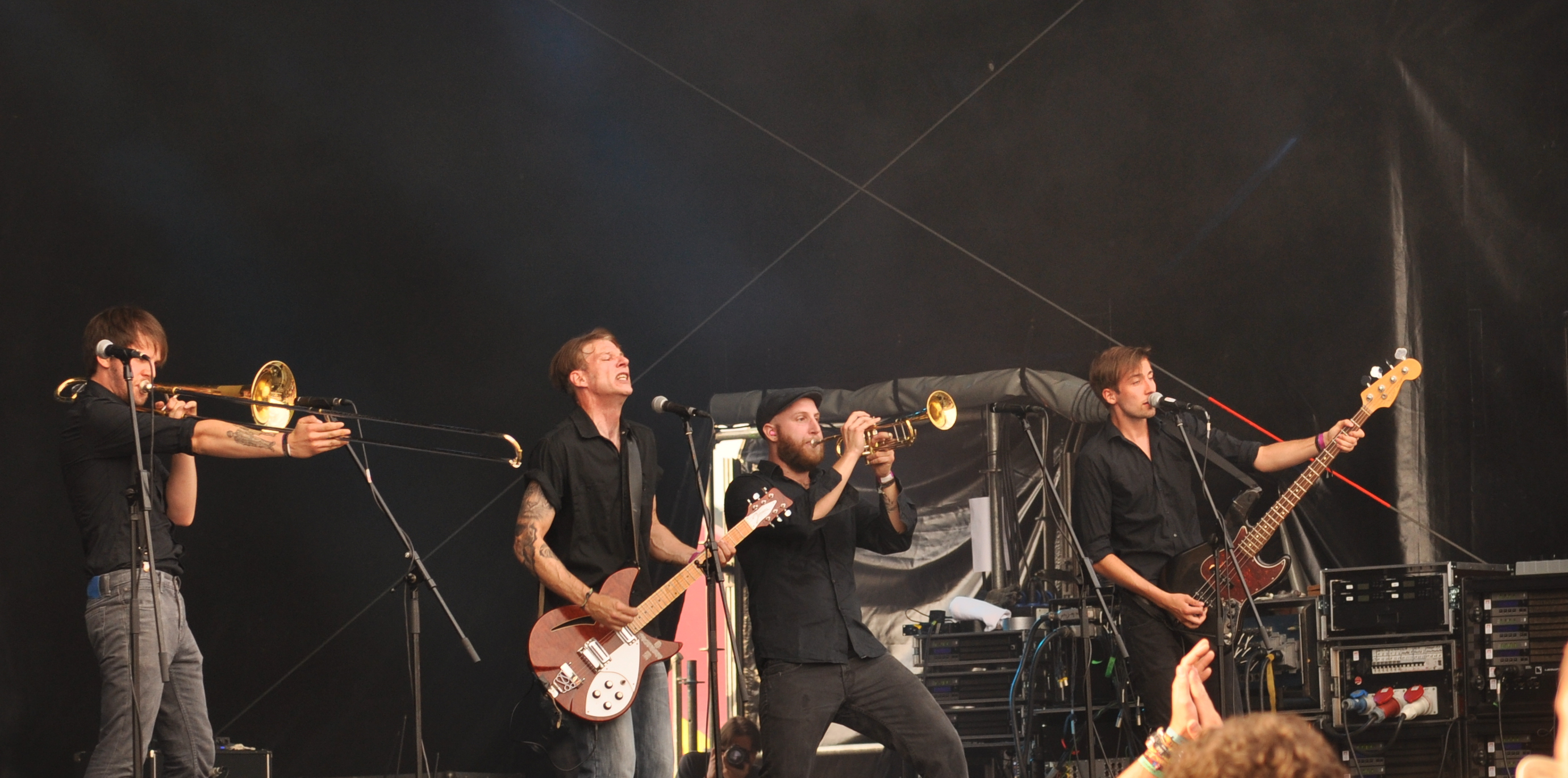 Rantanplan bei Rocken am Brocken 2014